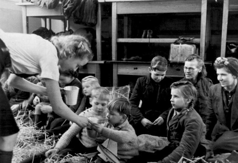 ADN-ZB-Archiv II. Weltkrieg 1939-45 Flüchtlinge aus den deutschen Ostgebieten werden am 12.2.1945 in einer vorläufigen Sammelstelle in Appenrode/Dänemark versorgt. In einigen Stunden werden diese Frauen und Kinder in vorbereitete Privatquartiere in Nordschleswig gebracht. Aufnahme: Krämer [Scherl Bilderdienst]